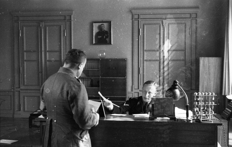 Reinhard Heydrich SS-Brigadeführer Heydrich Leiter der bayer. Polizei - Aufnahme im Büro mit Adjutanten Alfred Naujocks 11.4.34 Abgebildete Personen: Heydrich, Reinhard: SS-Obergruppenführer, Leiter des SD, Chef des Reichssicherheitshauptamtes (RSHA), Deutschland (GND 118550640) Naujocks, Alfred Helmut (Rücken zum Fotografen): GND 119288982